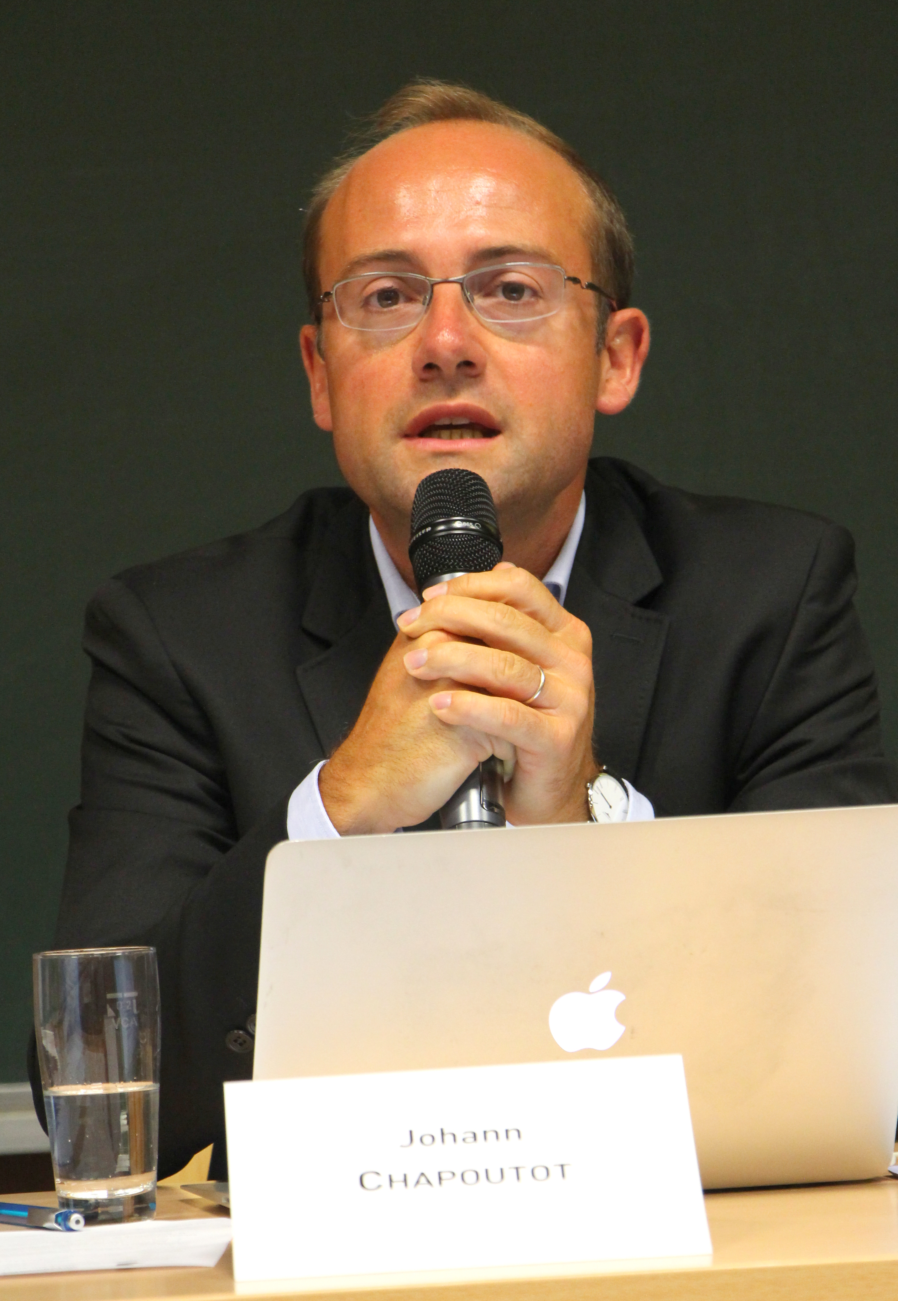 Historikertag 2014 in Göttingen.